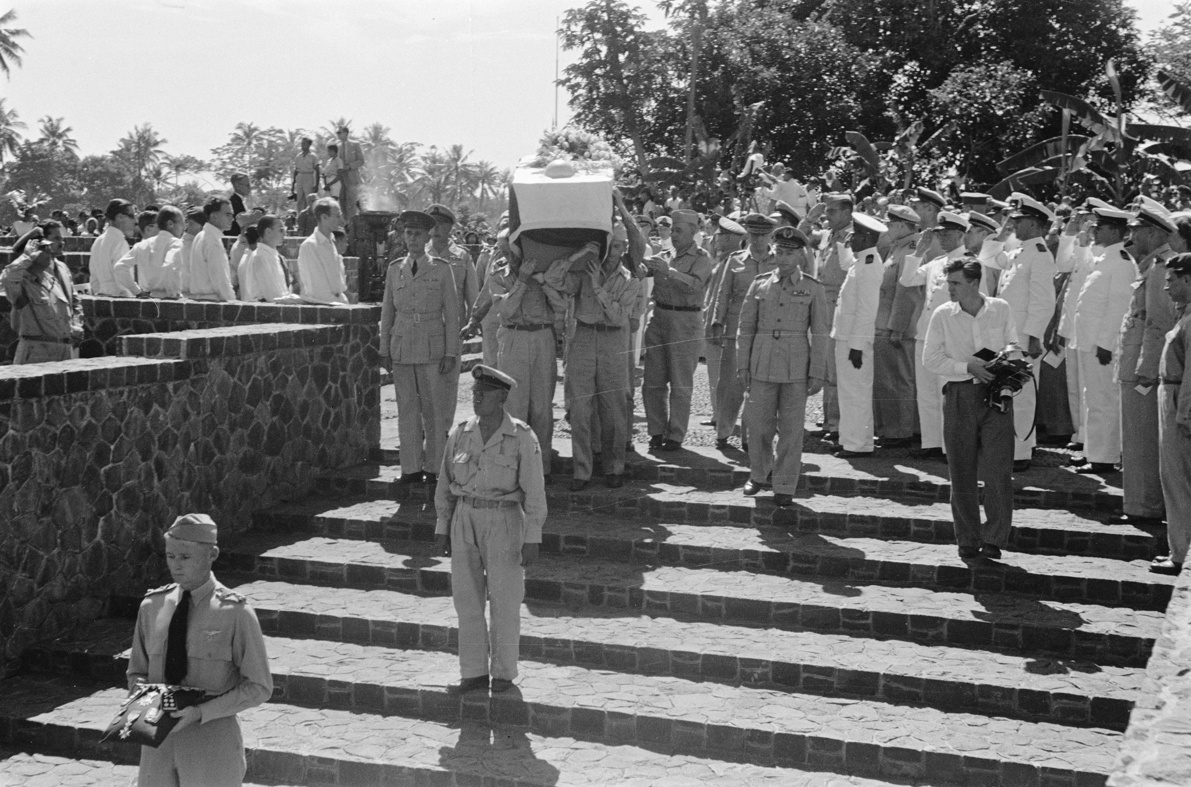 Collectie / Archief : Fotocollectie Dienst voor Legercontacten Indonesië Reportage / Serie : [DLC] Begrafenis generaal Spoor Beschrijving : Begrafenis generaal Spoor [op Ereveld Menteng Pulo] Annotatie : De slippendragers zijn de generaals P. Scholten, J.J. Mojet, P. Alons en W.K. Baay Datum : 28 augustus 1949 Locatie : Batavia, Indonesië, Jakarta, Nederlands-Indië Fotograaf : Fotograaf Onbekend / DLC Auteursrechthebbende : Nationaal Archief Materiaalsoort : Negatief (zwart/wit) Nummer archiefinventaris : bekijk toegang 2.24.04.02 Bestanddeelnummer : 4071